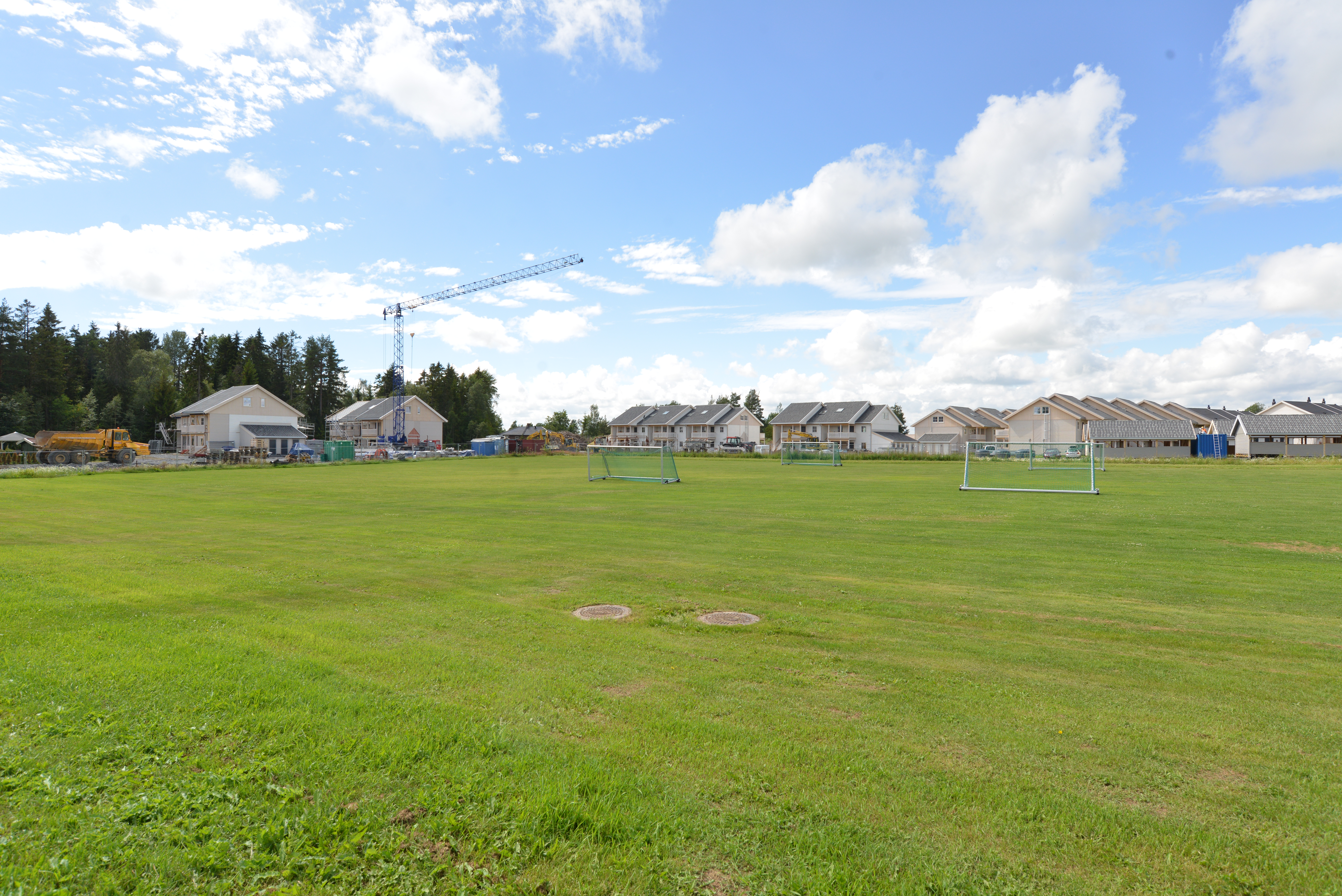 Hektisk byggeaktivitet på Borgen